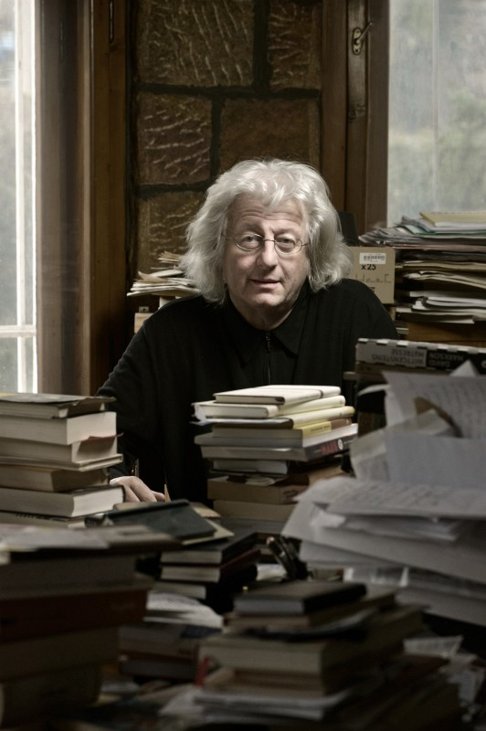 Esterházy Péter magyar író, publicista, a Digitális Irodalmi Akadémia alapító tagja.